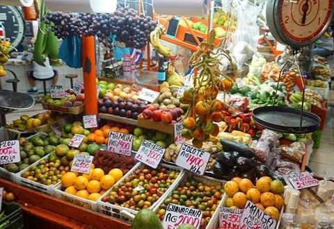 Una verdulería del Mercado Central de San José, noviembre de 2018.